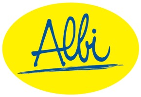 verze do roku 2016